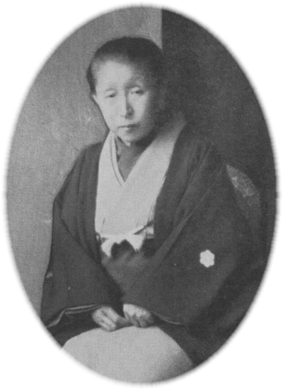 松平千代子肖像写真